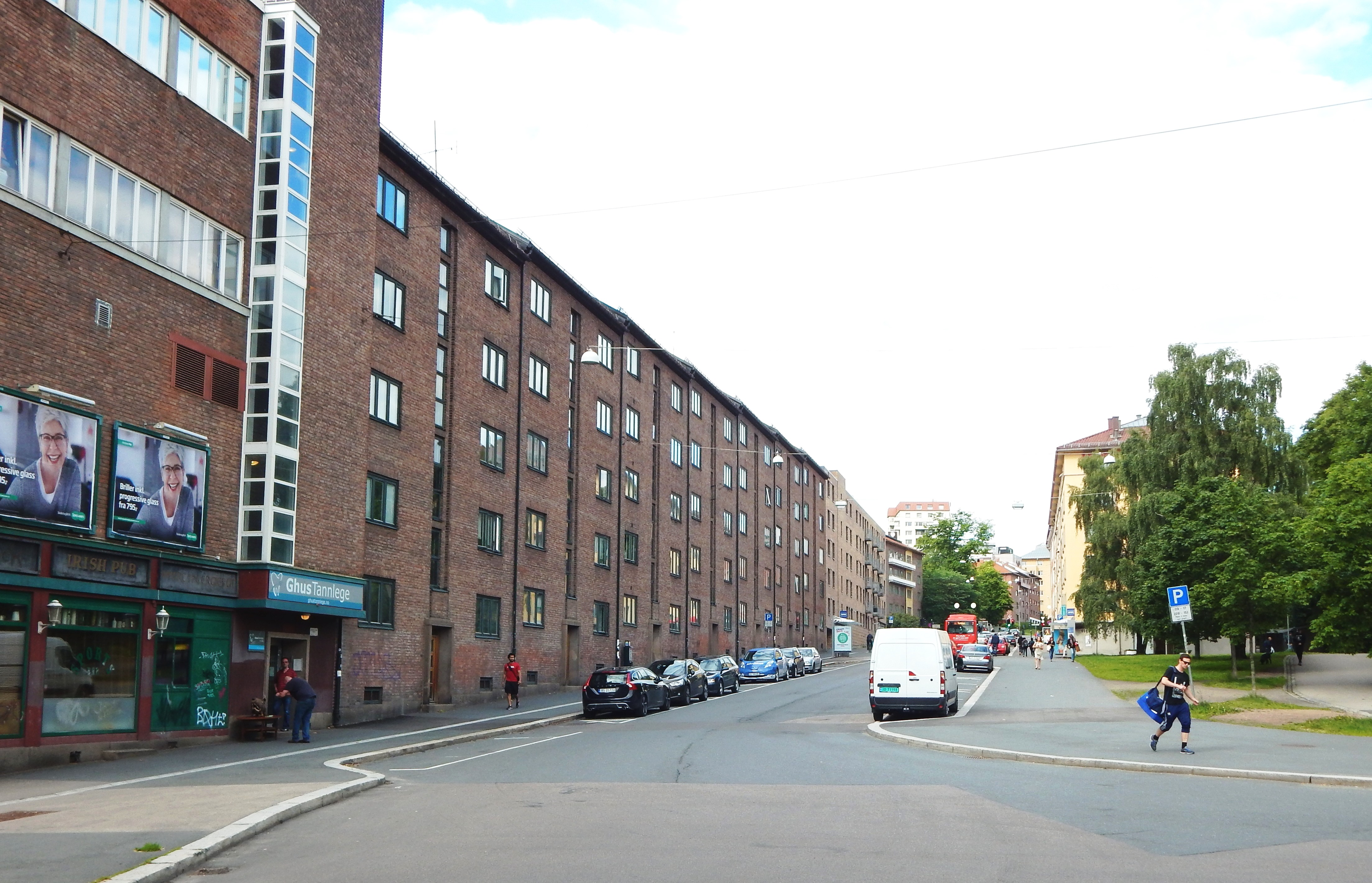 Fagerheimgata